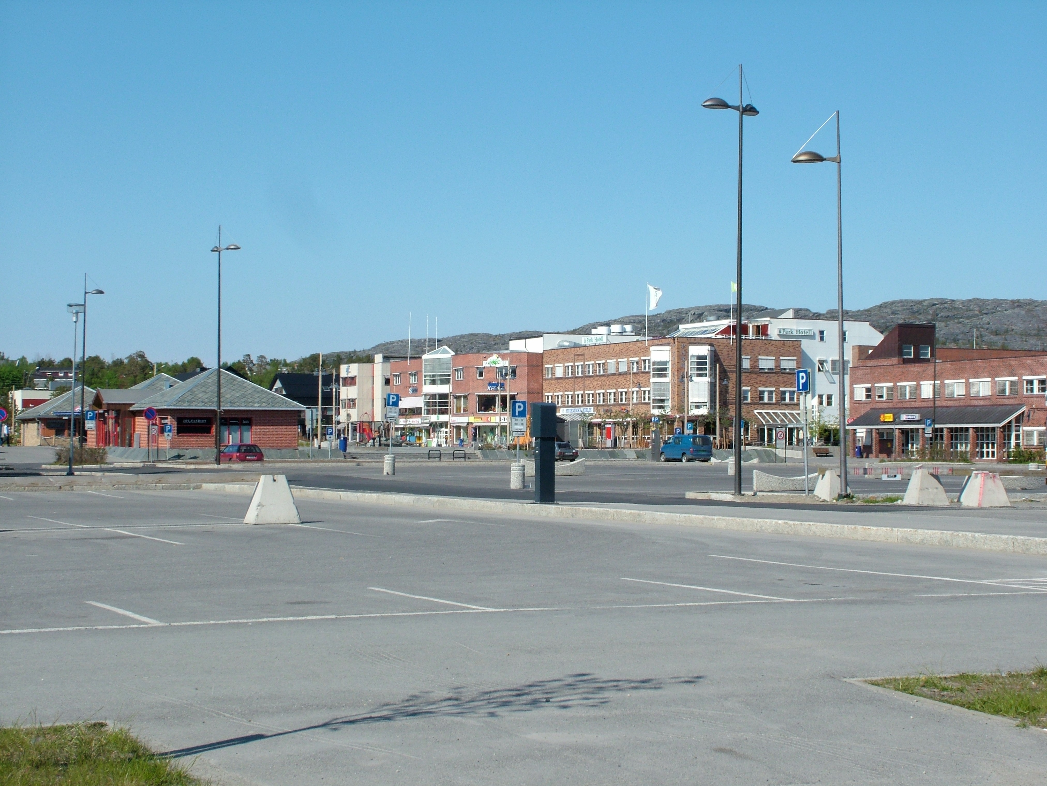 Das Zentrum von Alta in Nordnorwegen an einem Sonntag. Zu sehen sind die Post, ein Hotel und ein Einkaufszentrum mit der Tourisinformation und der Verwaltung von Alta.